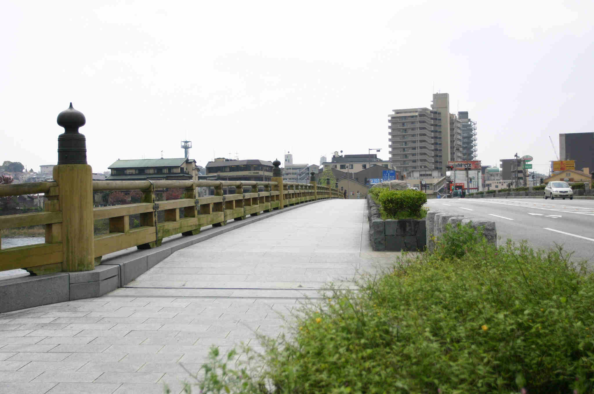 Uji bridge